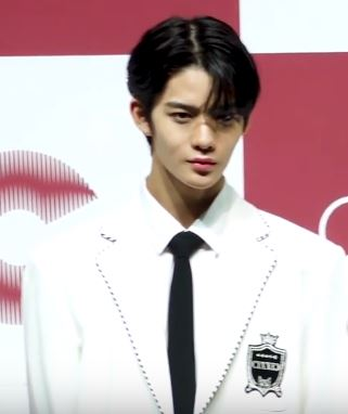 ‘CIX’ 두 번째 미니앨범 ‘HELLO Chapter 2. Hello, Strange Place’ 쇼케이스가 19일 오후 서울 광진구 광장동 예스24 라이브홀에서 열렸다.